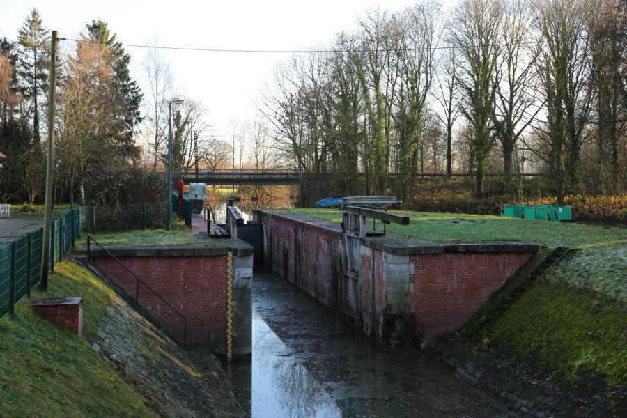 Die kleine Schleuse bei Uentrop wurde in der ersten Hälfte des 19. Jahrhunderts erbaut und gegen Ende des Jahres 1827 in Betrieb genommen. Sie diente im Verbund mit 11 anderen Schleusen ähnlicher Bauart dazu, die Lippe zwischen Lippstadt und Wesel schiffbar zu machen.